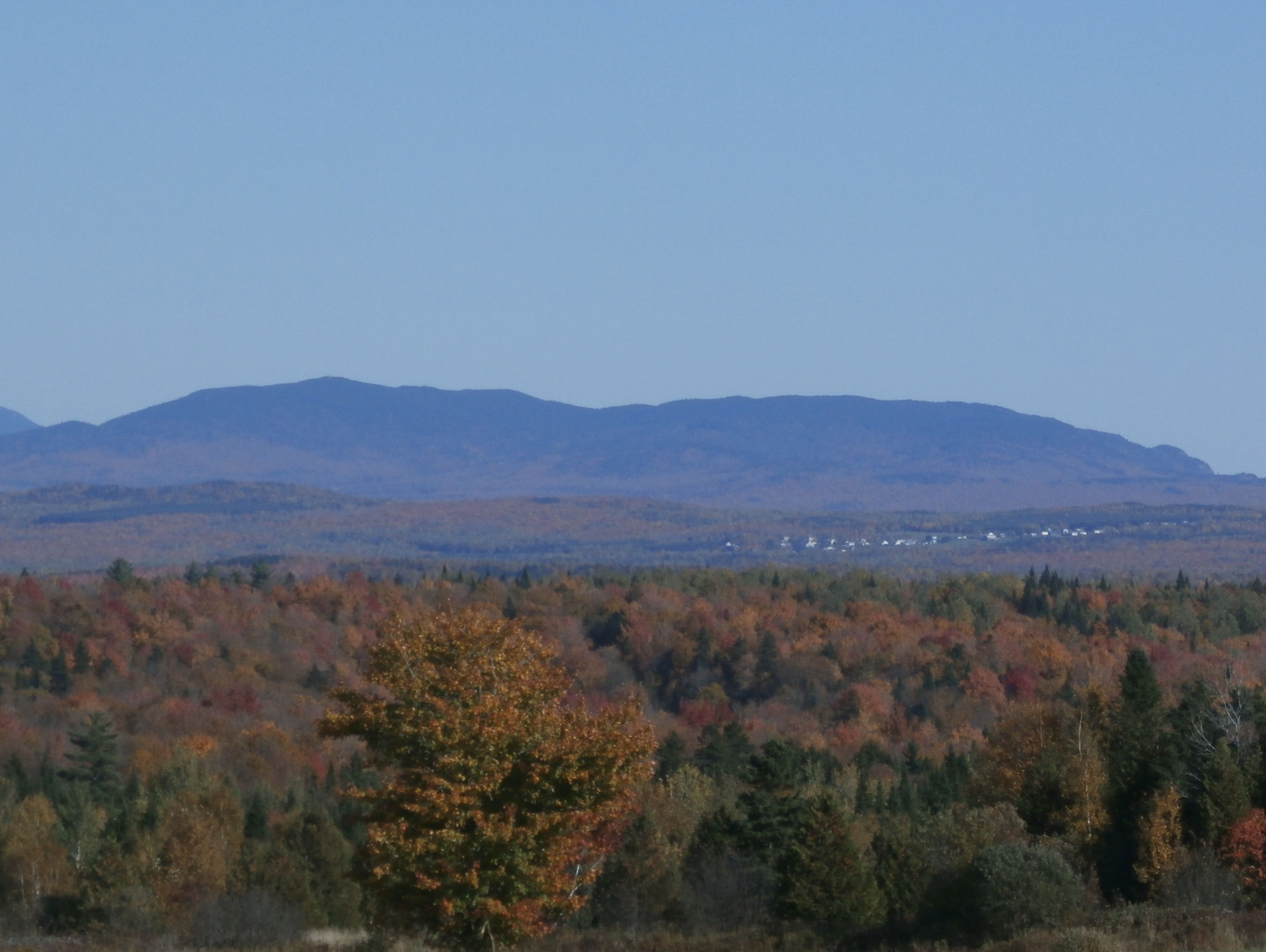 Le mont Bélanger derrière le village de Saint-Robert-Bellarmin vu du rang Ludgine à Lac-Drolet.